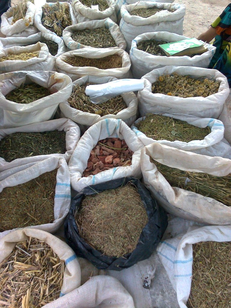 Лечебные травы в Худжайпаке (Хужайпок), юг Узбекистане. В основном эндемические виды растений.